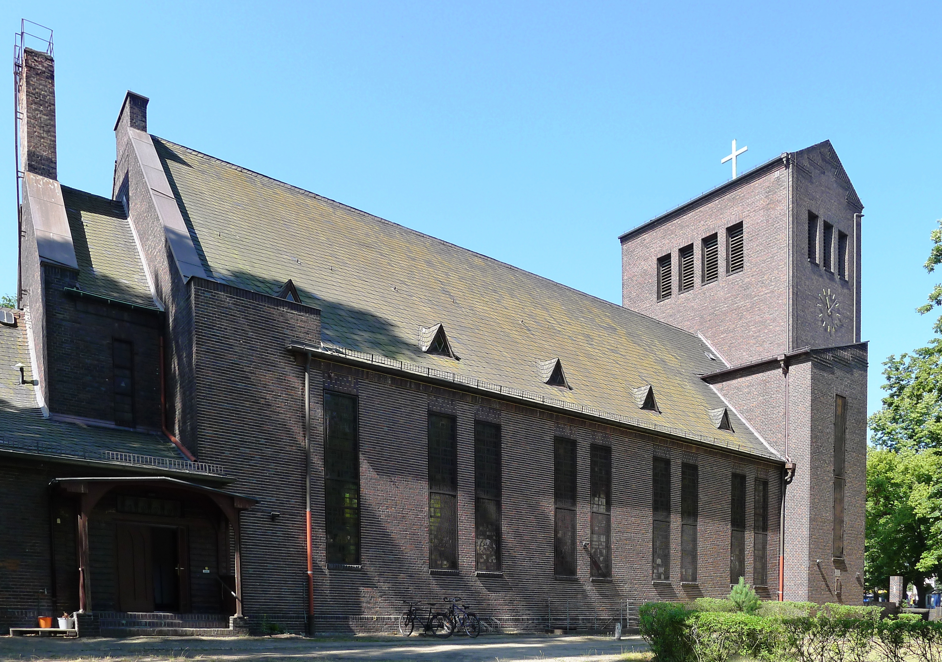 Blick auf Kirchenschiff und Turm